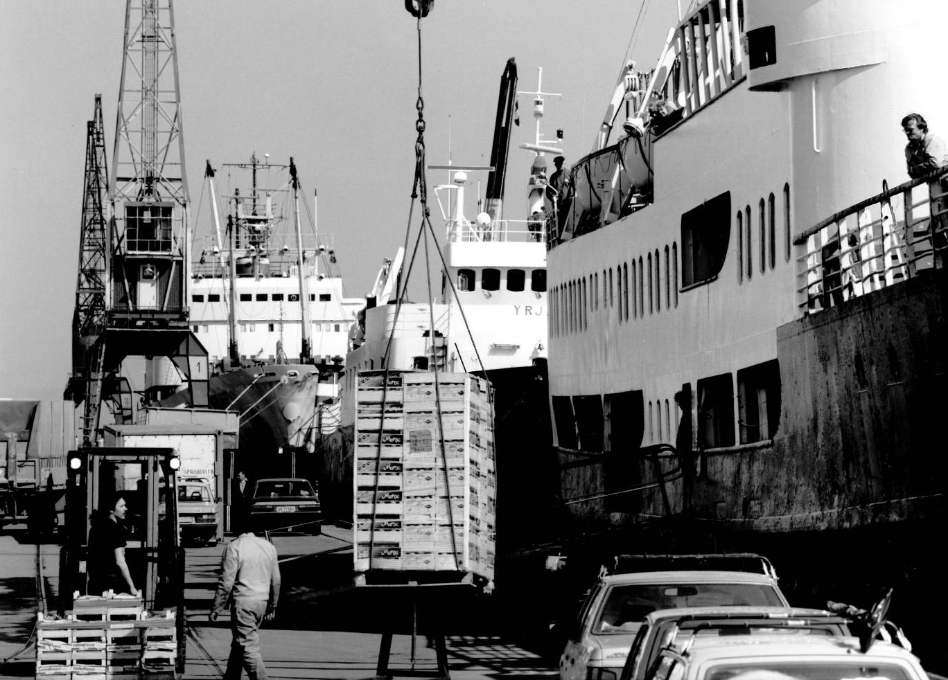 Hurtigruten MS Polarlys losser appelsiner ved Pir II. Foran ligger Yrjar og et tredje, ukjent skip.